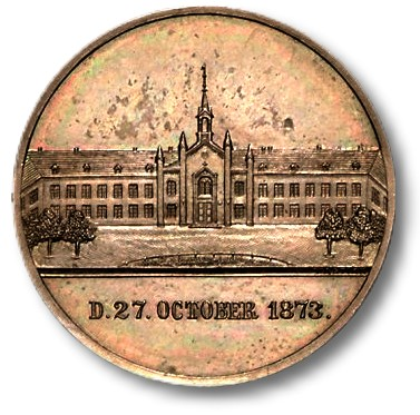 Bijou zu den drei Schwerter und Asträa zur grünenden Raute 1873